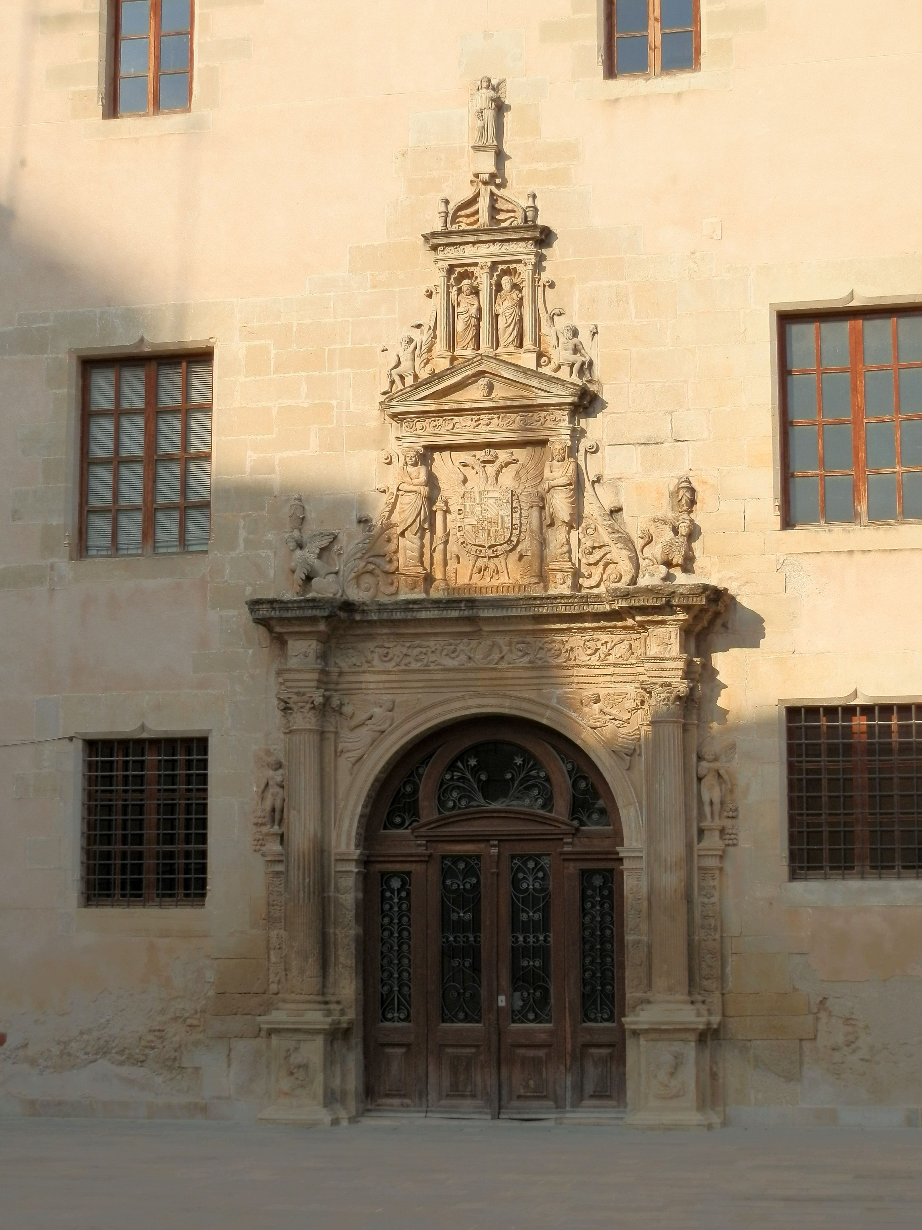 Puerta de la fachada renacentista. En la parte central está el escudo imperial de su fundador, Carlos I. Sobre este escudo, dos hornacinas con las figuras de San Jaime y San Matías, patrones del colegio, y sobre ellas la figura de un ángel